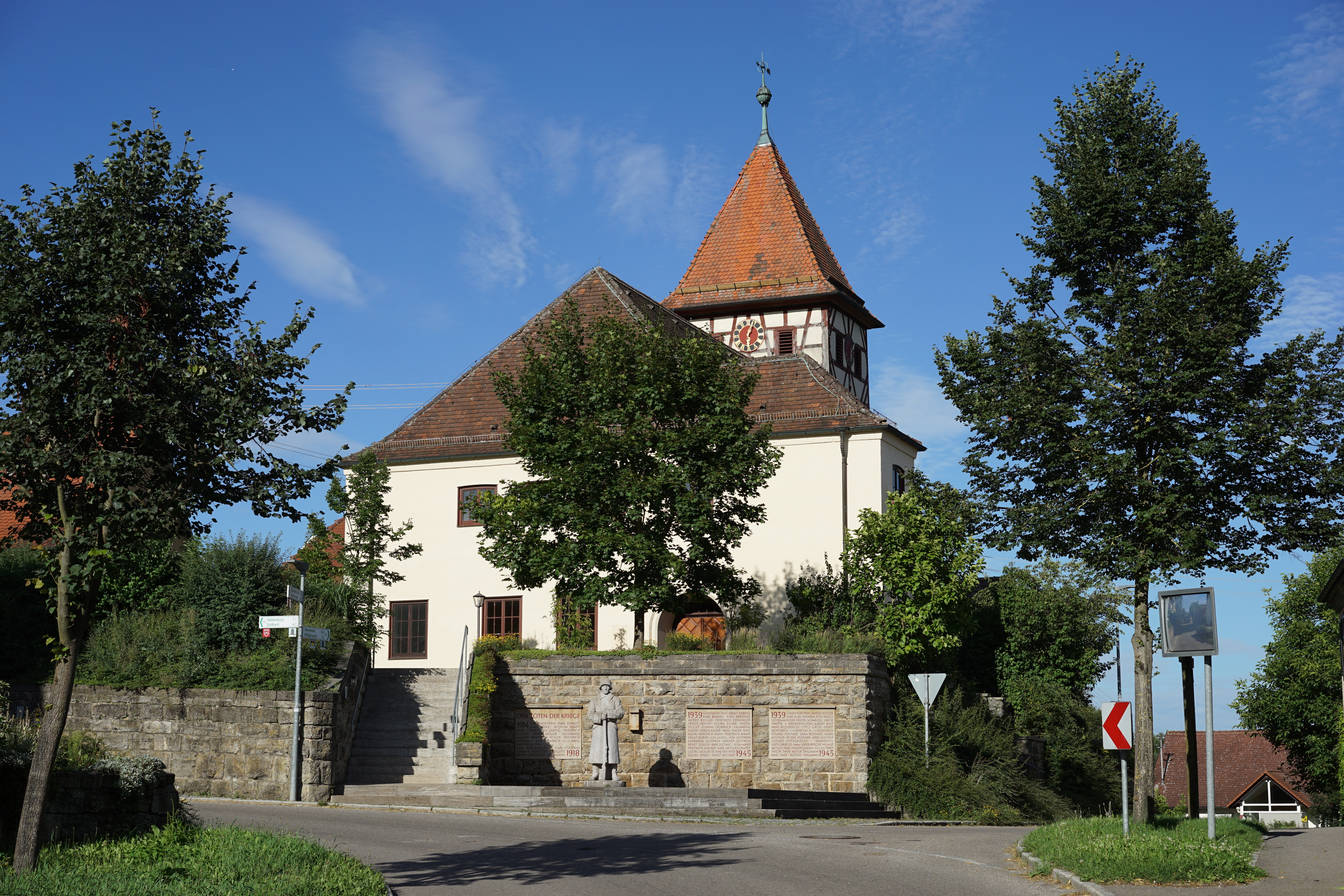 Schwäbisch Hall, Stadtteil Gailenkirchen: Blick von Westen auf die Pfarrkirche, davor das Gefallenendenkmal. Standort: auf der Waldenburger Straße.